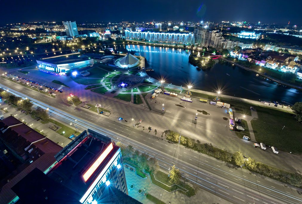 Victors' (Pieramožcaŭ) Avenue in Minsk